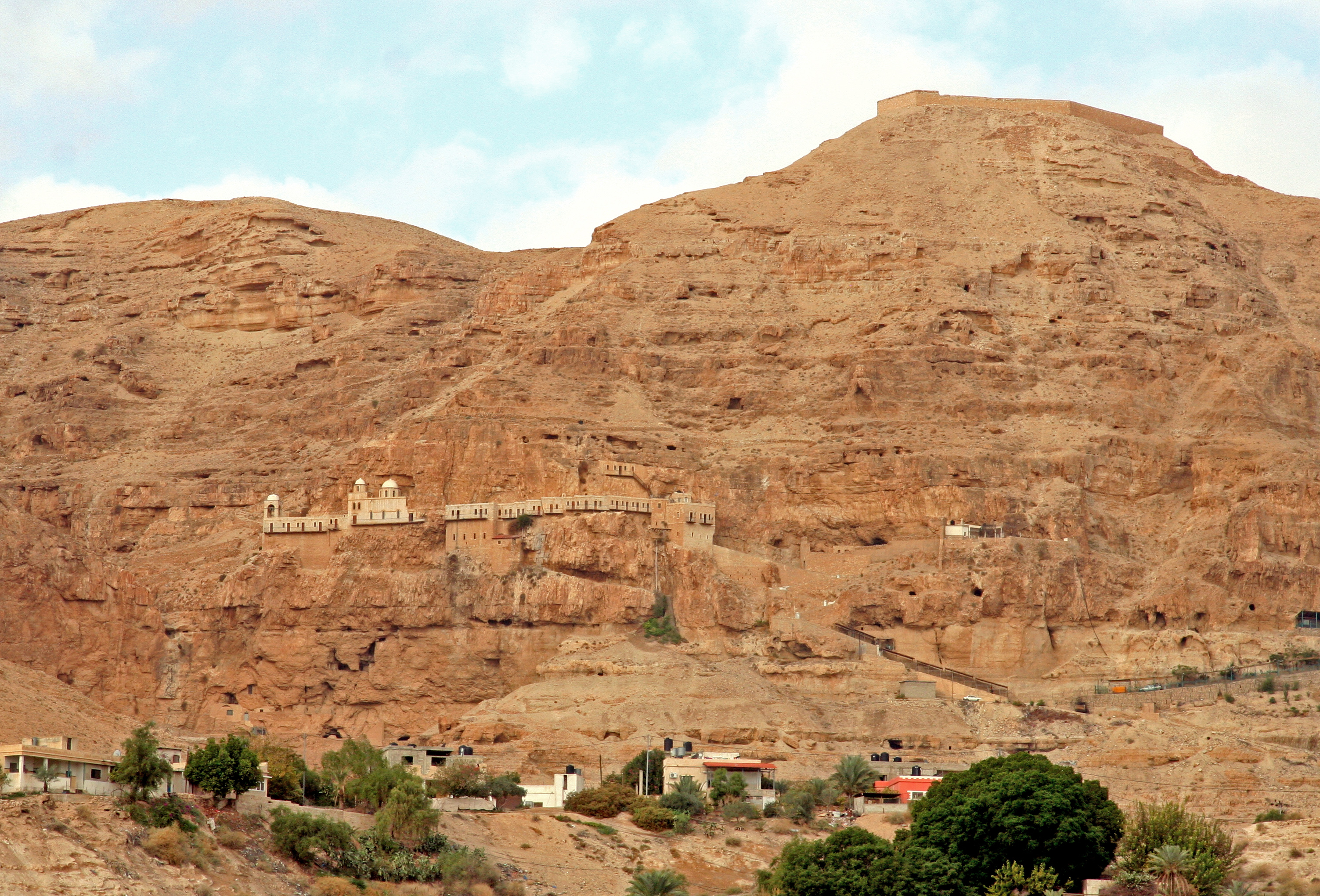 Jericho (more details in the photo's title) יריחו (מידע נוסף בשם הקובץ)